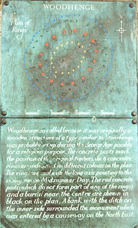 Woodhenge plakkaat, in de buurt van Avebury, foto van Ezel